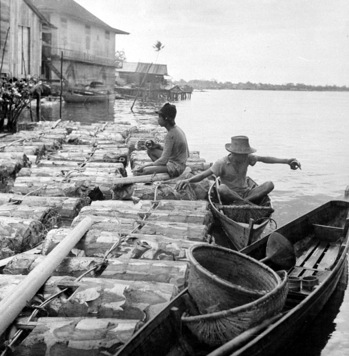 Repronegatief. Gekapte sagostammen worden stroomafwaarts op de rivier bij Pontianak gevlot, West-Borneo